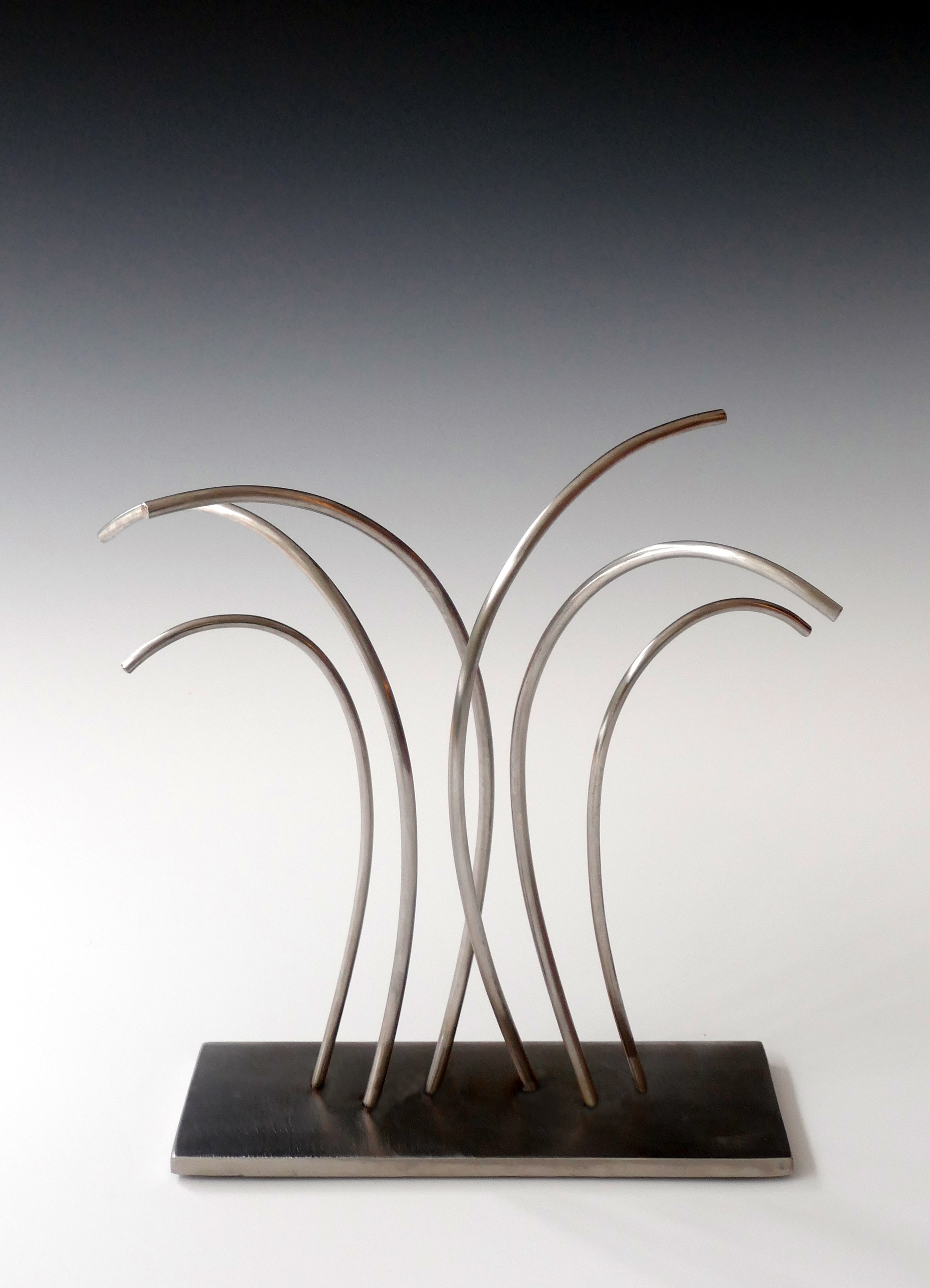 Beate Schroedl-Baurmeister, Momentum (Model, 2016) 27x25x10cm, Edelstahl